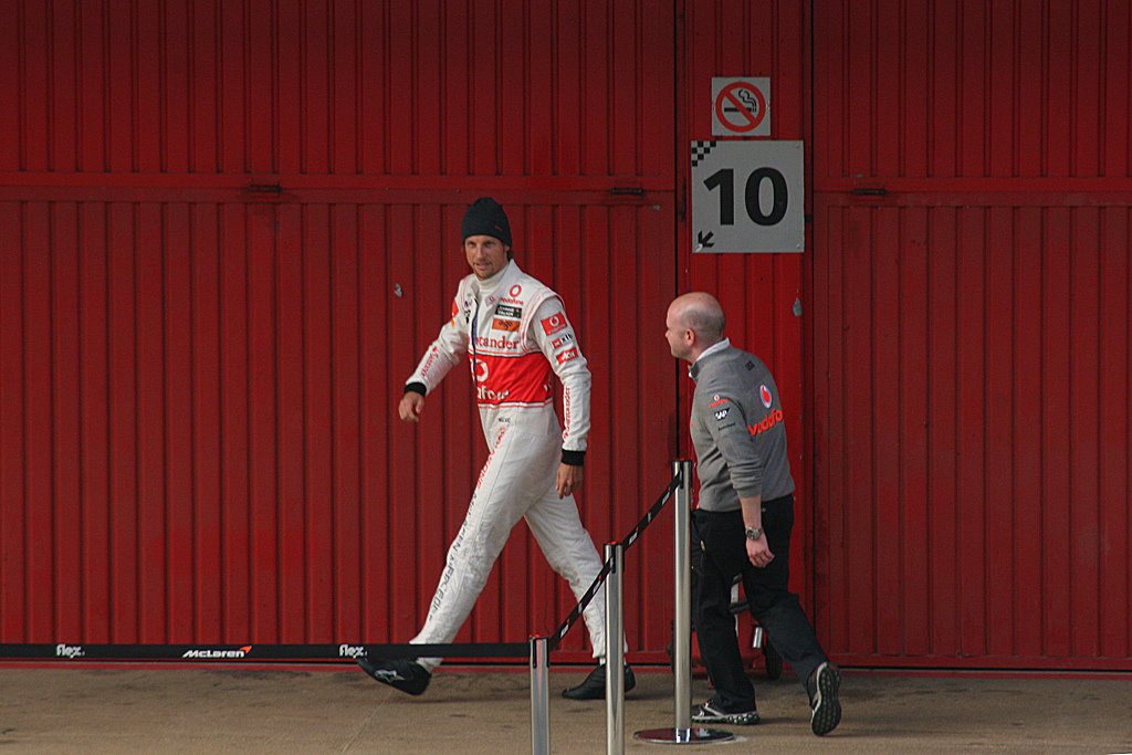 F1 Test Days. Circuit de Catalunya